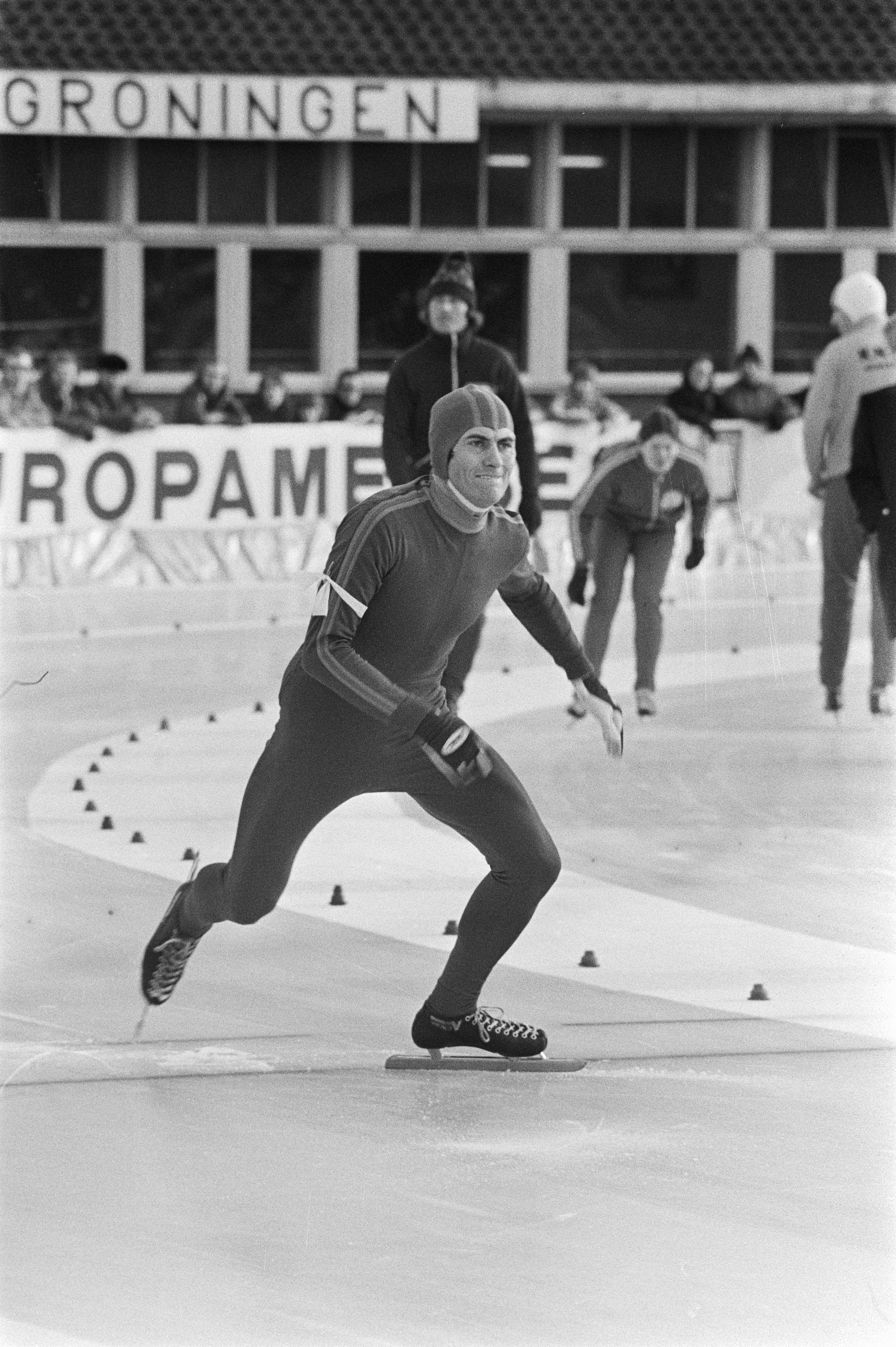 Collectie / Archief : Fotocollectie Anefo Reportage / Serie : [ onbekend ] Beschrijving : Nederlandse kampioenschappen schaatsen in Groningen; Eppie Bleeker in aktie Datum : 10 januari 1976 Locatie : Groningen Trefwoorden : schaatsen, sport Persoonsnaam : Bleeker, Eppie Fotograaf : Verhoeff, Bert / Anefo Auteursrechthebbende : Nationaal Archief Materiaalsoort : Negatief (zwart/wit) Nummer archiefinventaris : bekijk toegang 2.24.01.05 Bestanddeelnummer : 928-3550